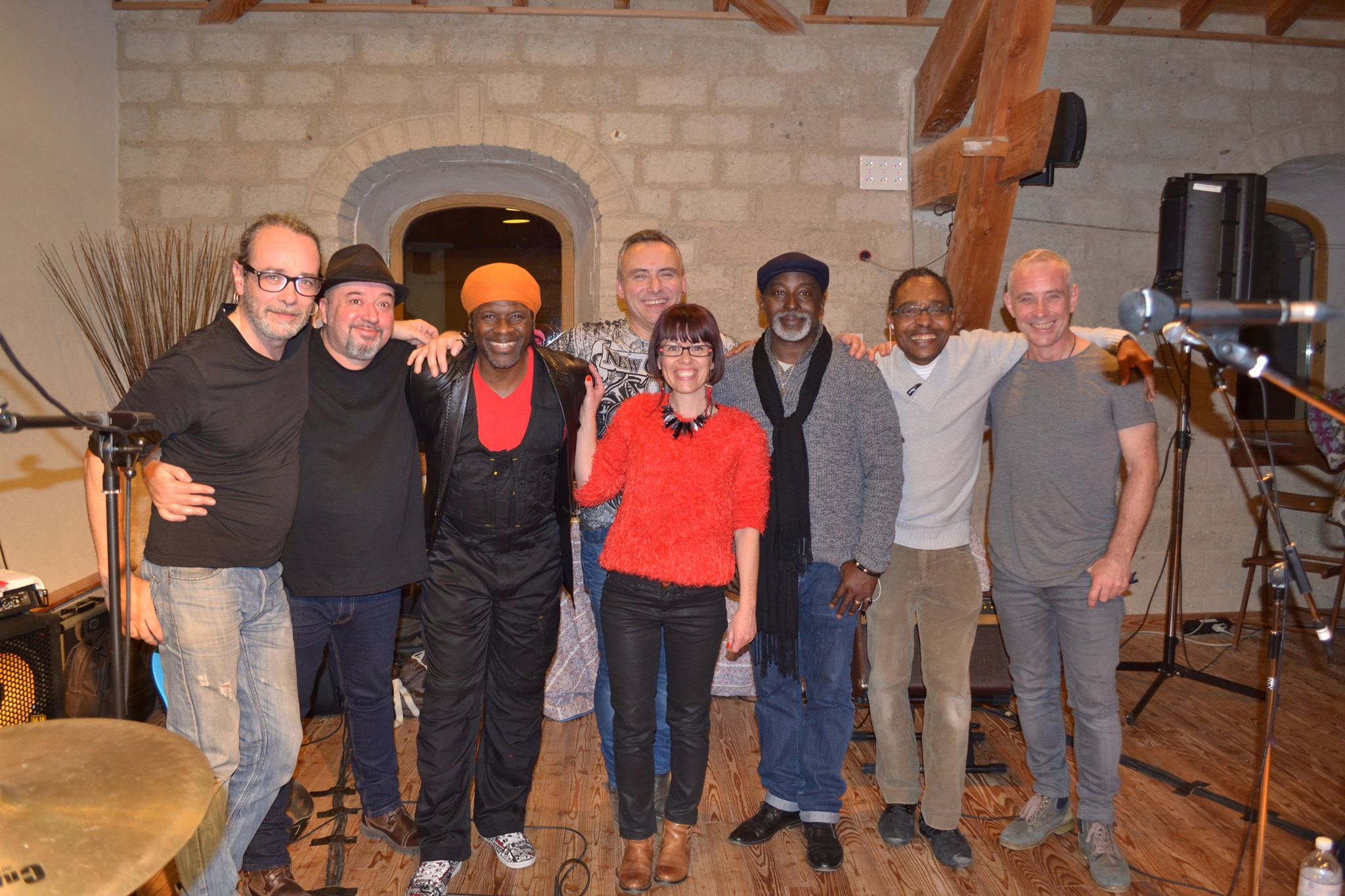 Antoine Laville est entouré des membres de By the gospel river